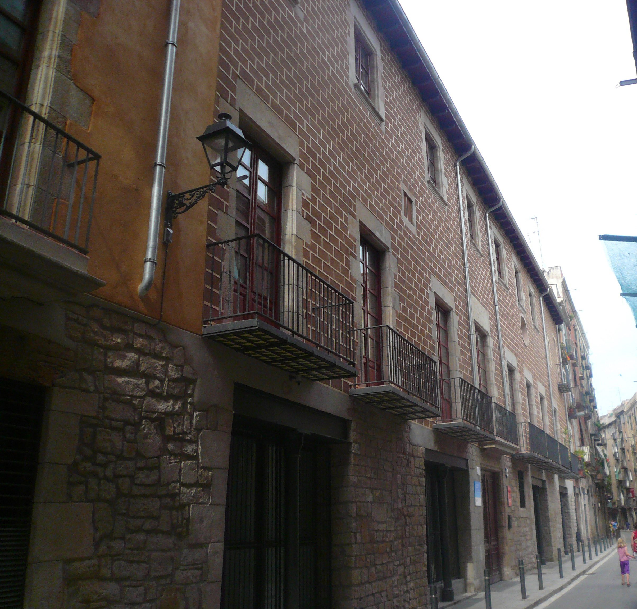 Antic Palau dels Marquesos d'Alós (Barcelona)